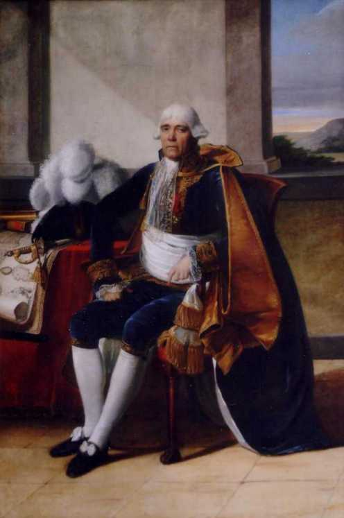 MAHB - Bayeux :Portait du sénateur Raphaël de Casabianca (Vescovato 1738 - Bastia 1825)